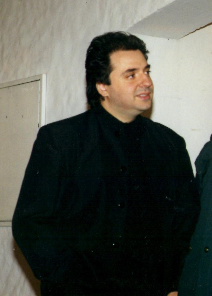 Fotografía del compositor y pianista argentino Lito Vitale.